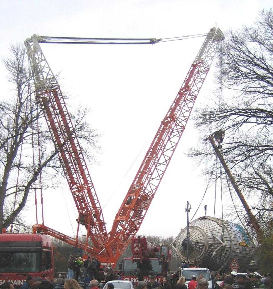 KATRIN am Haken des Schwerlastkrans unmittelbar nach dem Absetzen auf die 2 gekopelten Tieflader